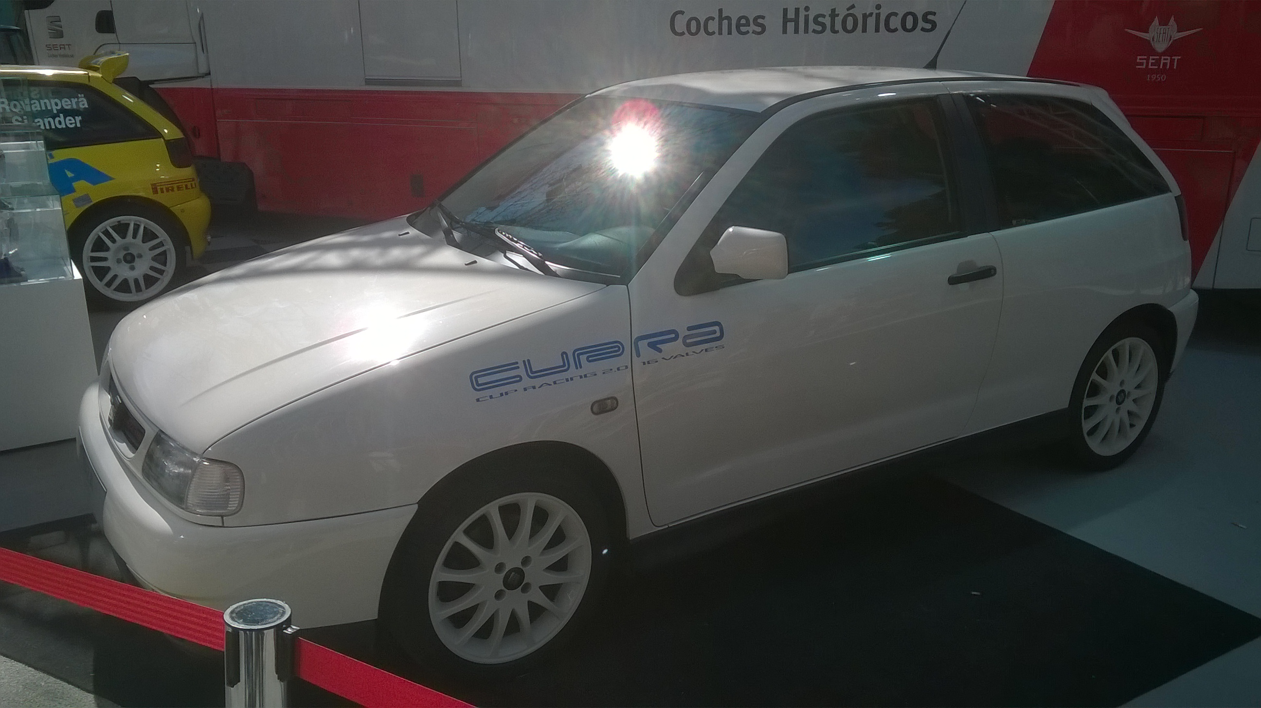 Fotos realizadas en ClassicAuto madrid, modelo procedente de la colección de SEAT, (SEAT Ibiza CUPRA Cup Racing 2.0 16 valves)